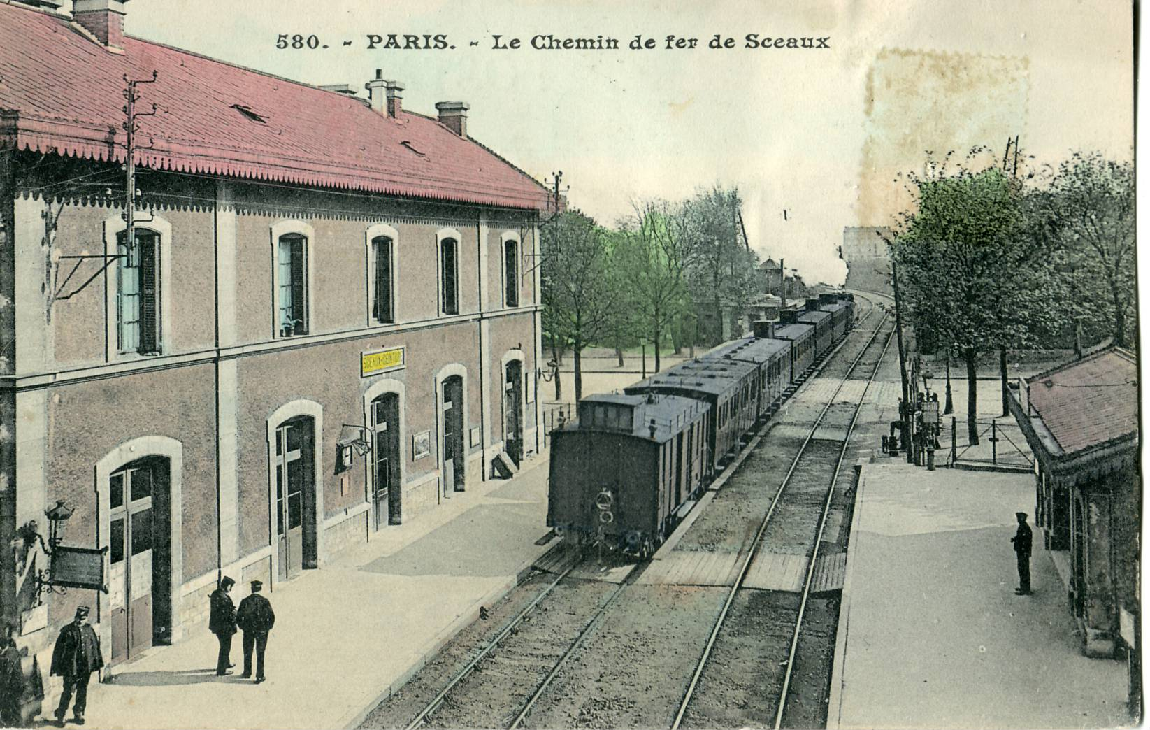 Carte postale ancienne, éditeur inconnu, N°580 Paris - Le chemin de fer de Sceaux (vue prise à Sceaux-Ceinture, actuelle Cité universitaire), qui donnait la correspondance avec la Petite Ceinture